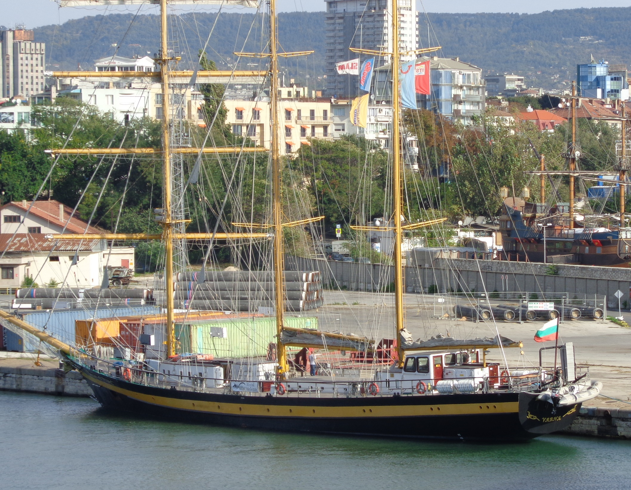 Segelschulschiff Kaliakra der bulgarischen Handelsmarine, im Hintergrund Gasröhren für South Stream.